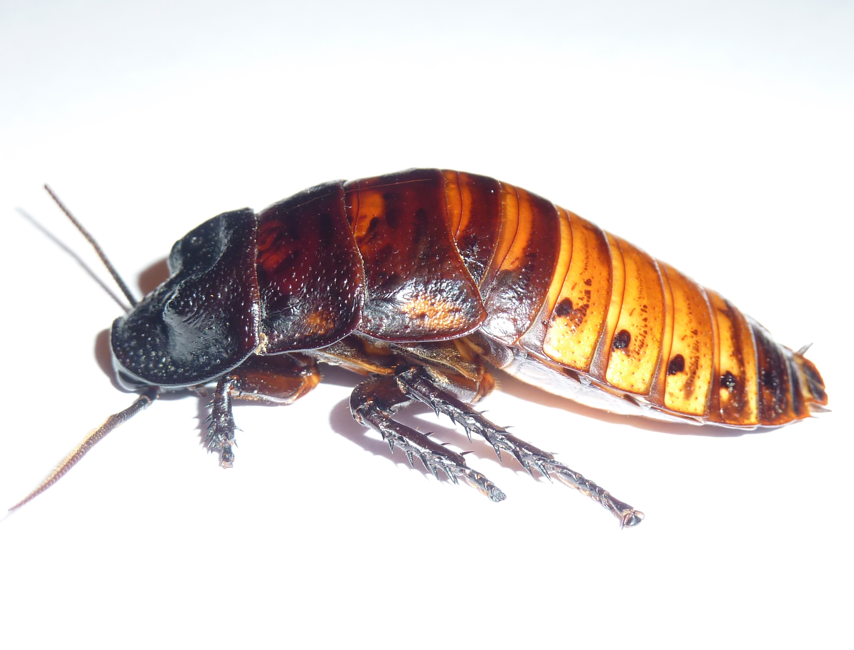 Mâle Gromphadorhina portentosa, on voit bien les excroissances sur le pronotum.